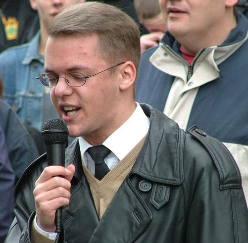 Axel Reitz bei Neonazi-Kundgebung am 16. April 2005 in Essen